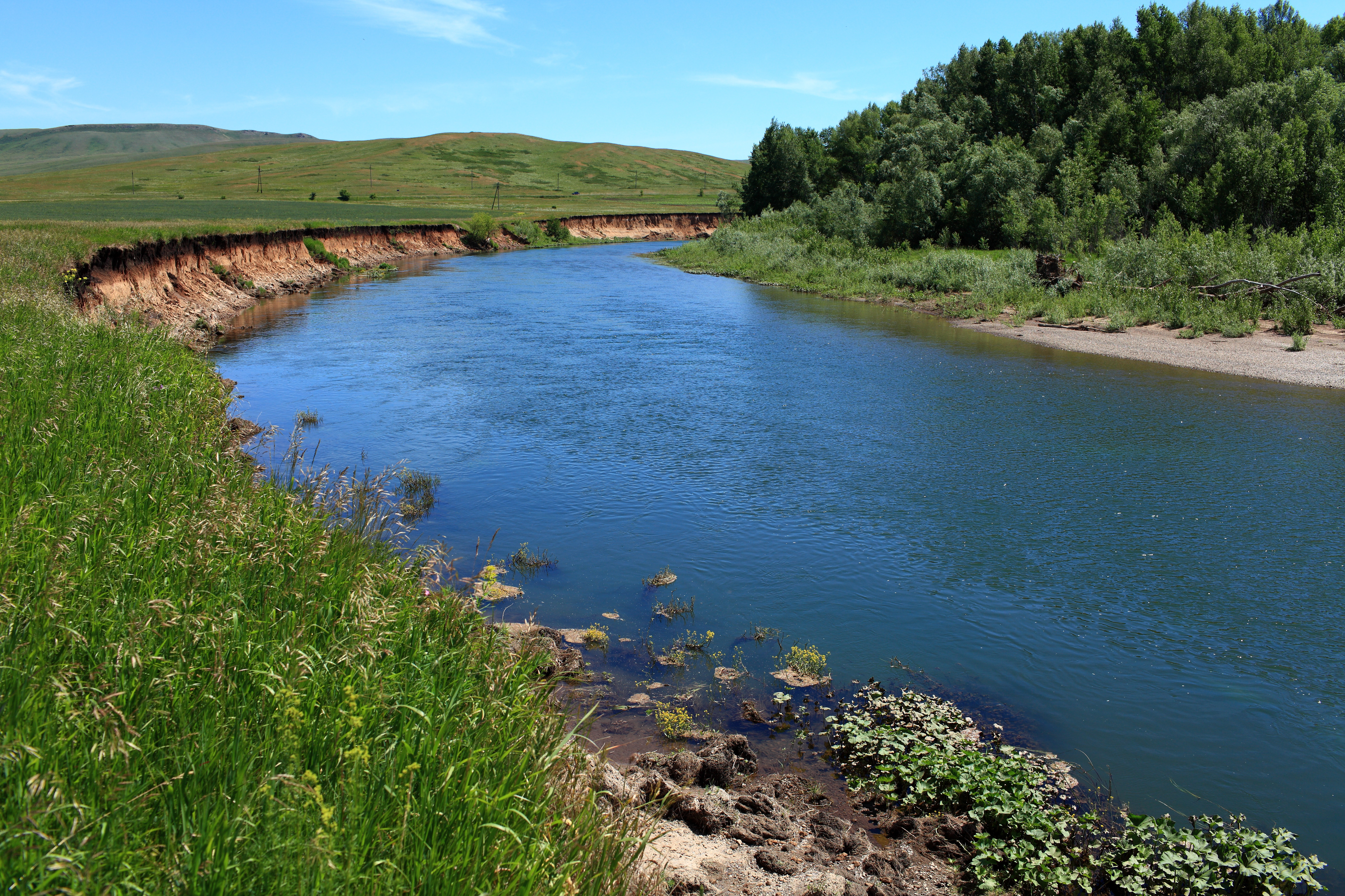 Река Большой Ик в восточном направлении